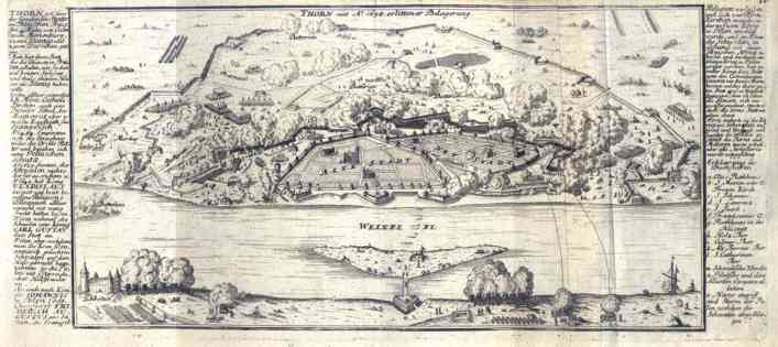 Thorn mit Anno 1658 erlittener Belagerung [G. Bodenehr]